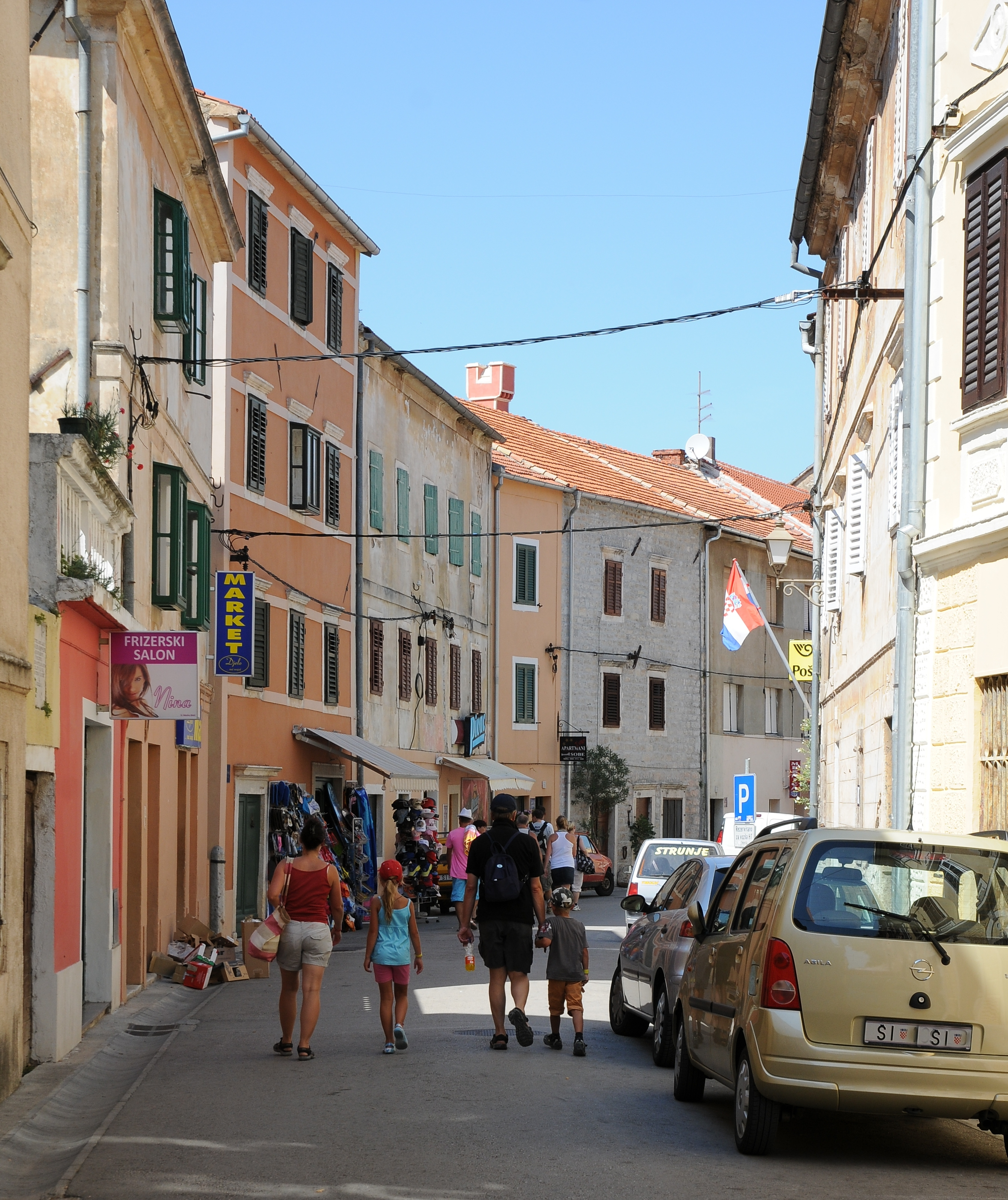 Skradin befindet sich in der Nähe Flusses Krka und grenzt an den gleichnamigen Nationalpark. Skradin ist 18 km von Šibenik und 100 km von Split entfernt. Die Hauptattraktion des Naturreservoirs Slapovi Krke ist eine Reihe von Wasserfällen, deren größter, Skradinski Buk, wurde nach der Stadt benannt.